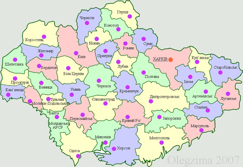 map of Okrugs of Ukraine in 1927